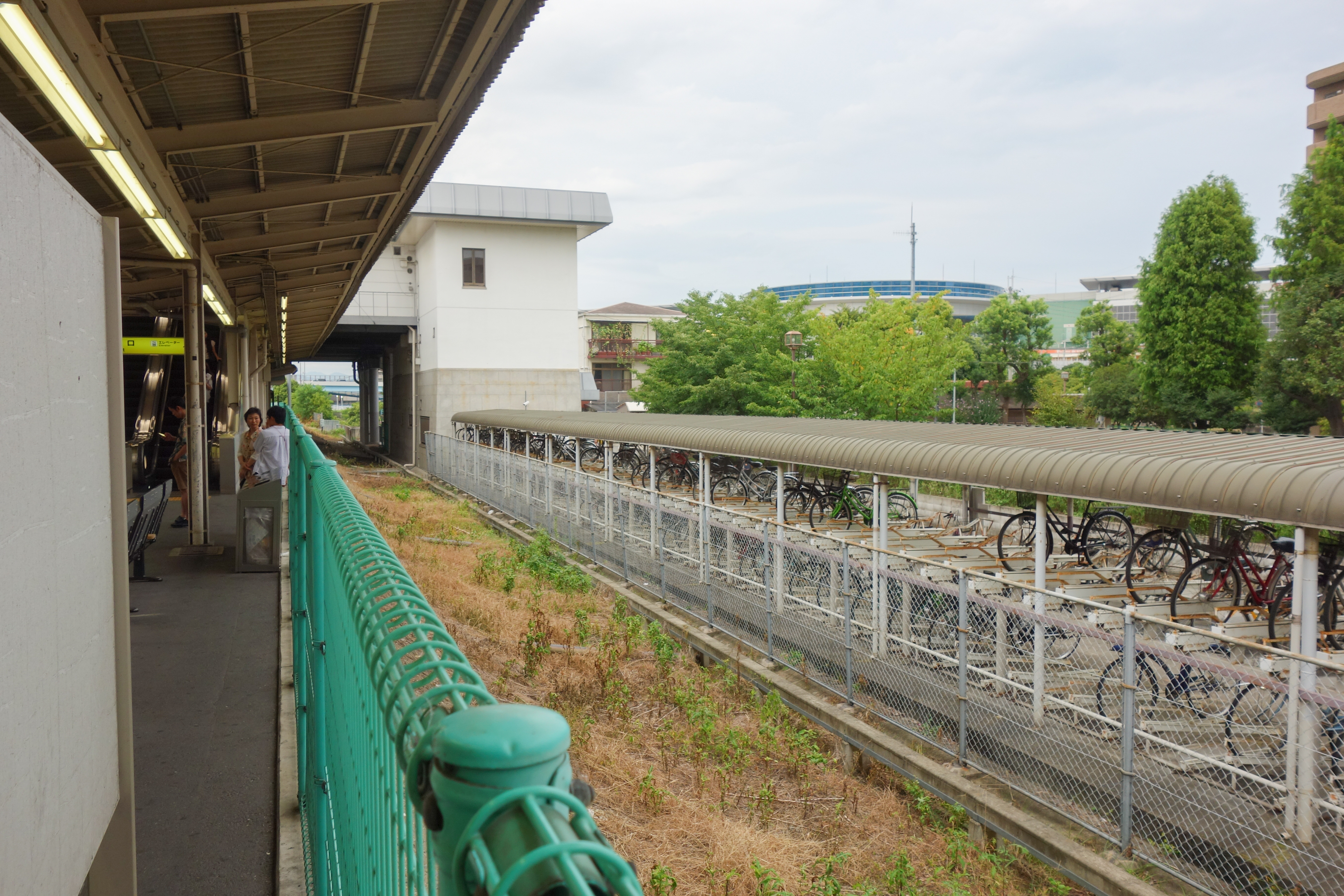 JR宝塚線（福知山線）伊丹駅 2番線ホーム横の線路用地